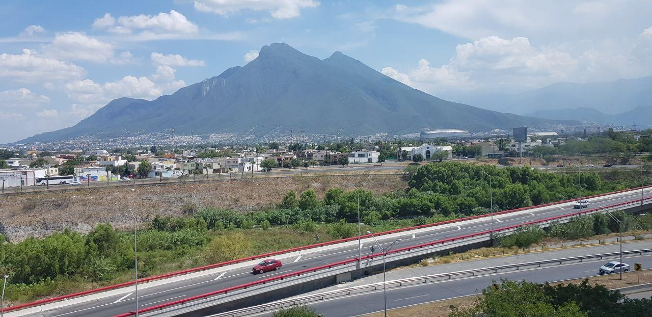 Montañas de guadalupe (Nuevo leon)